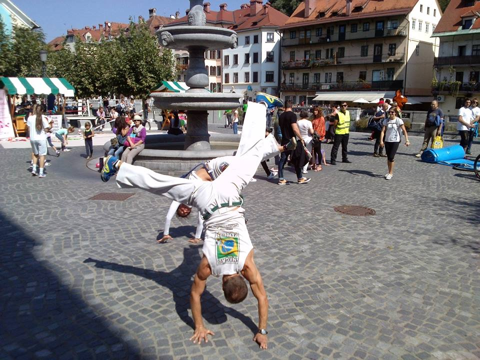 Predstavitev Capoeire; na fotografiji sta izkušena capoerista med izvajanjem talnih akrobacij na rokah imenovanih Au (kolo).